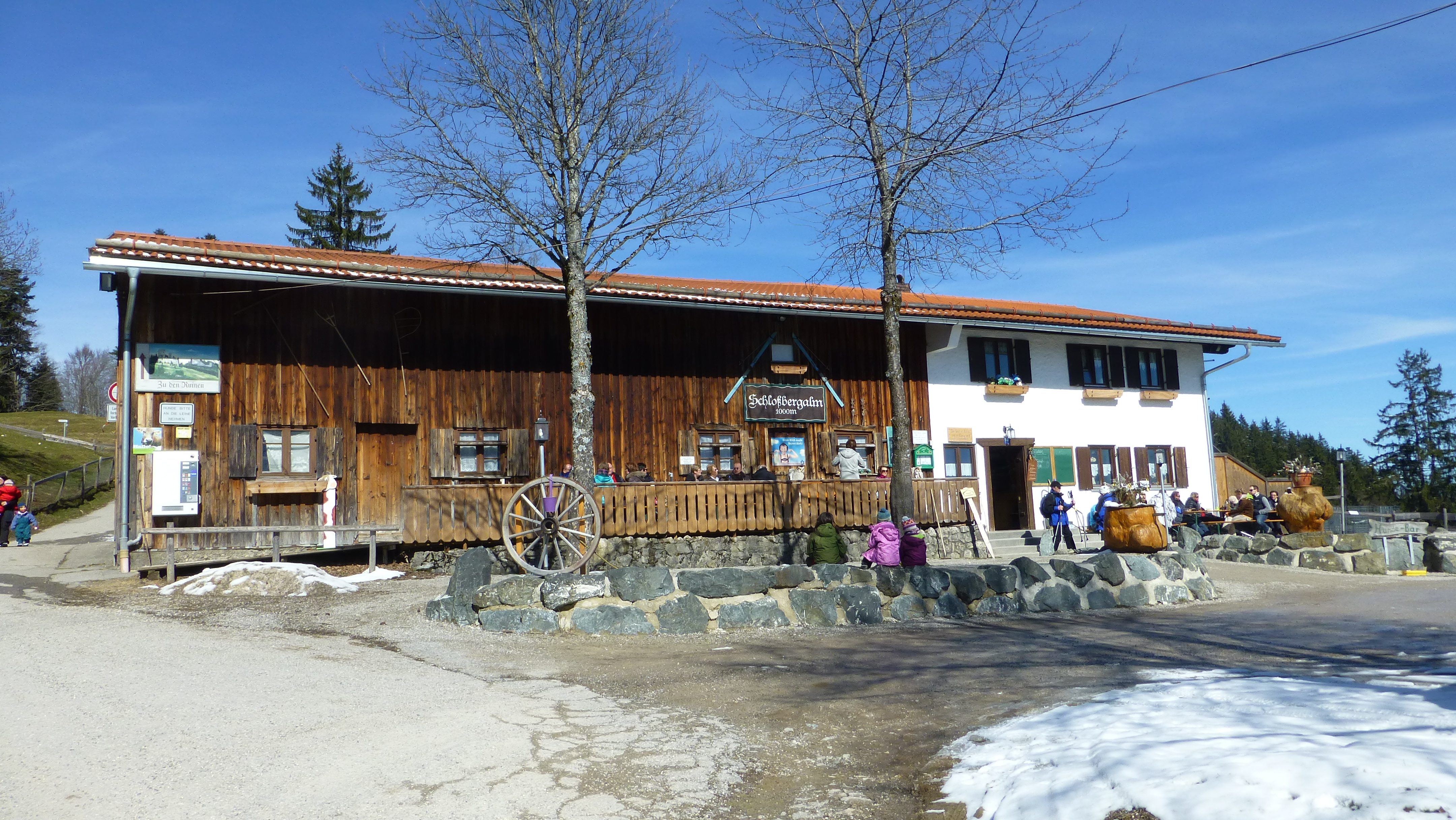 Die Schlossbergalpe in der Gemeinde Eisenberg, Ostallgäu